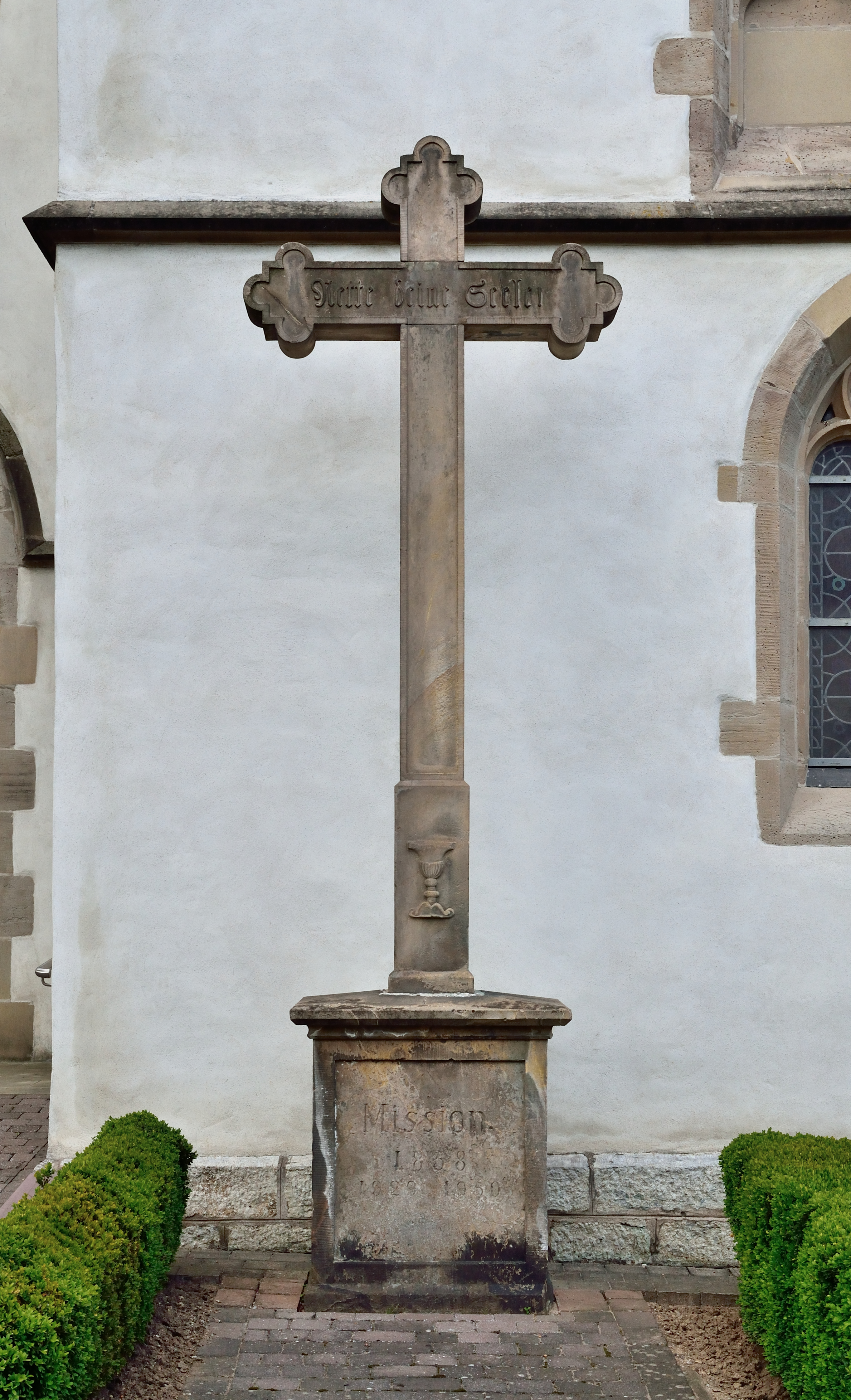 Missionskreuz vor der Pfarrkirche St. Liborius in Steinheim-Bergheim